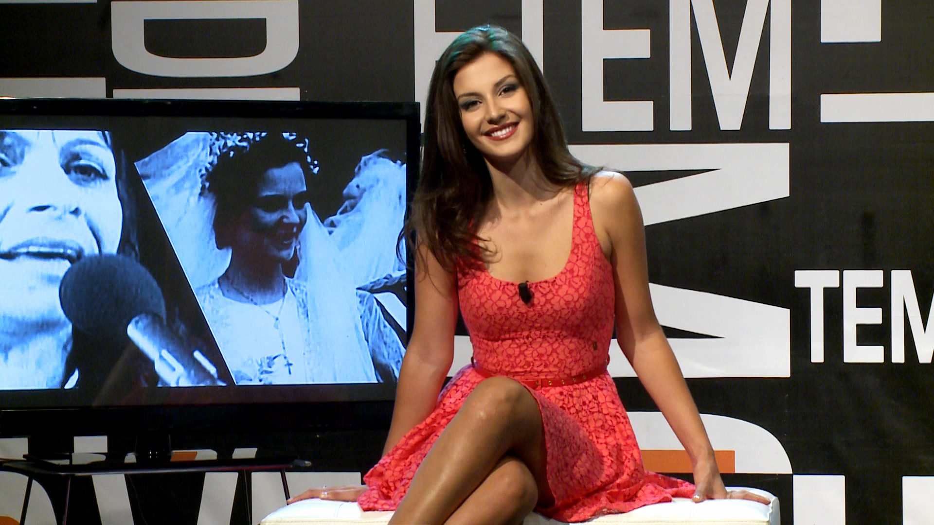 jovetemmode